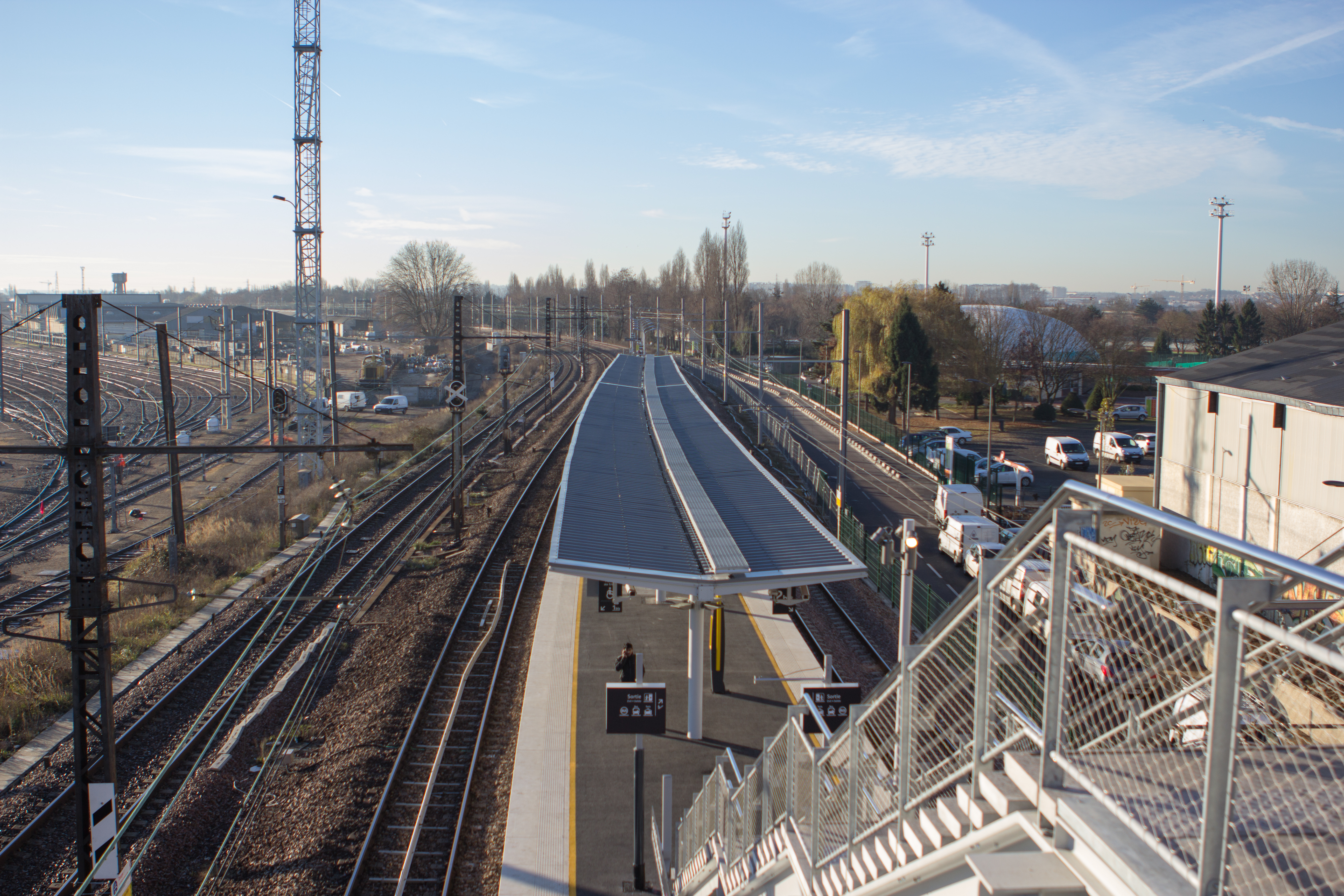 Gare de Créteil-Pompadour / RER D / Créteil, Val-de-Marne, France